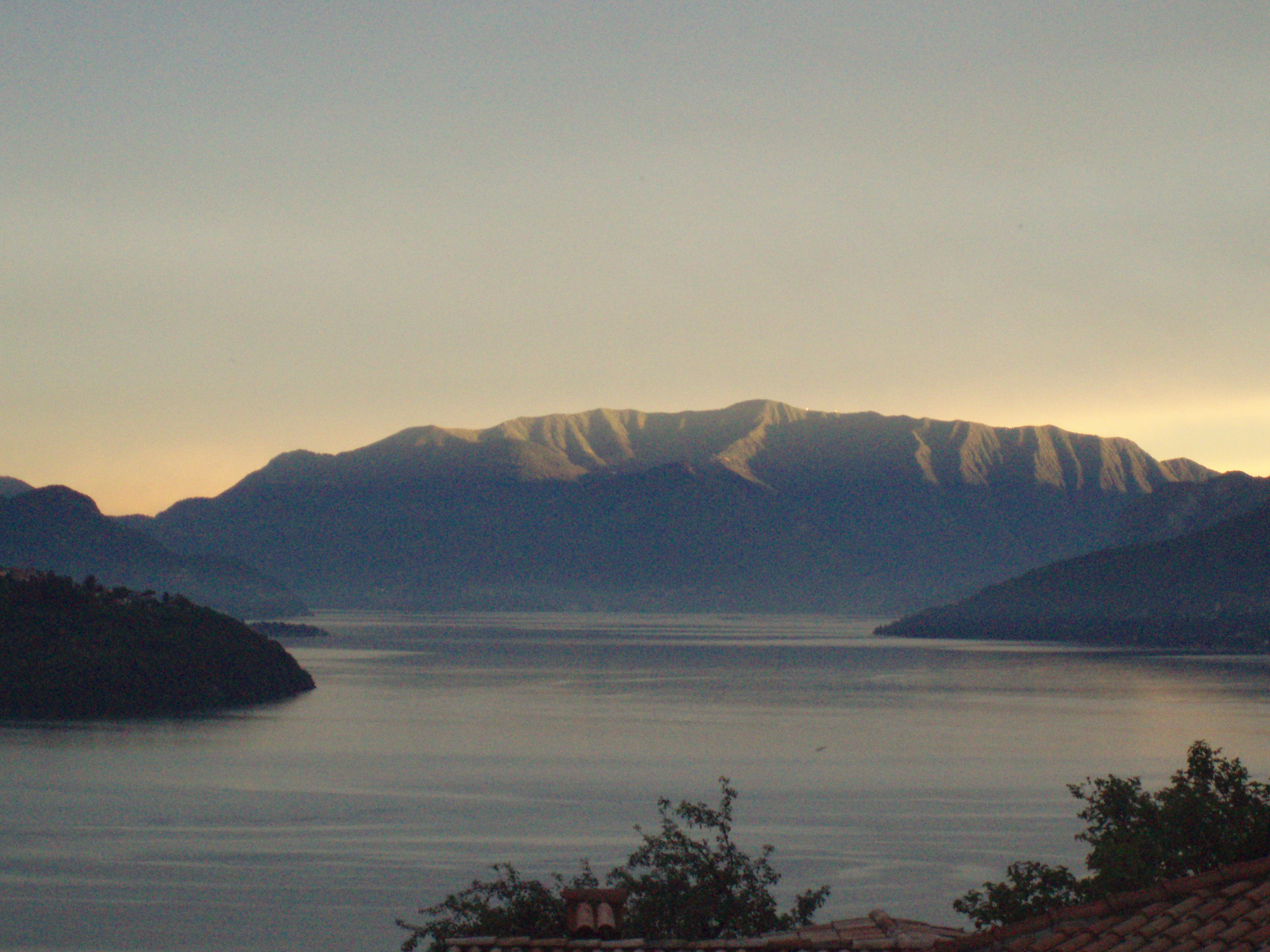 vista del Lago di Como da Domaso: si vede Bellagio e i due rami di Como e di Lecco.